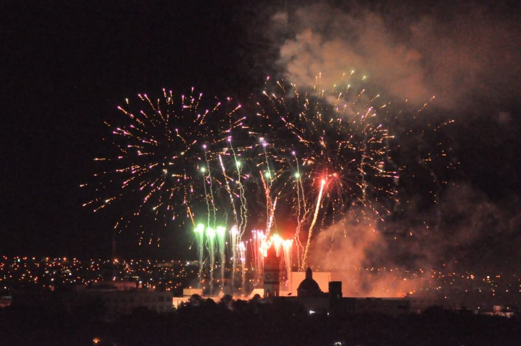 Luces y fuegos artificiales en la plaza del 15, celebración del día de la independencia de México, en Ciudad Victoria, Tamaulipas.